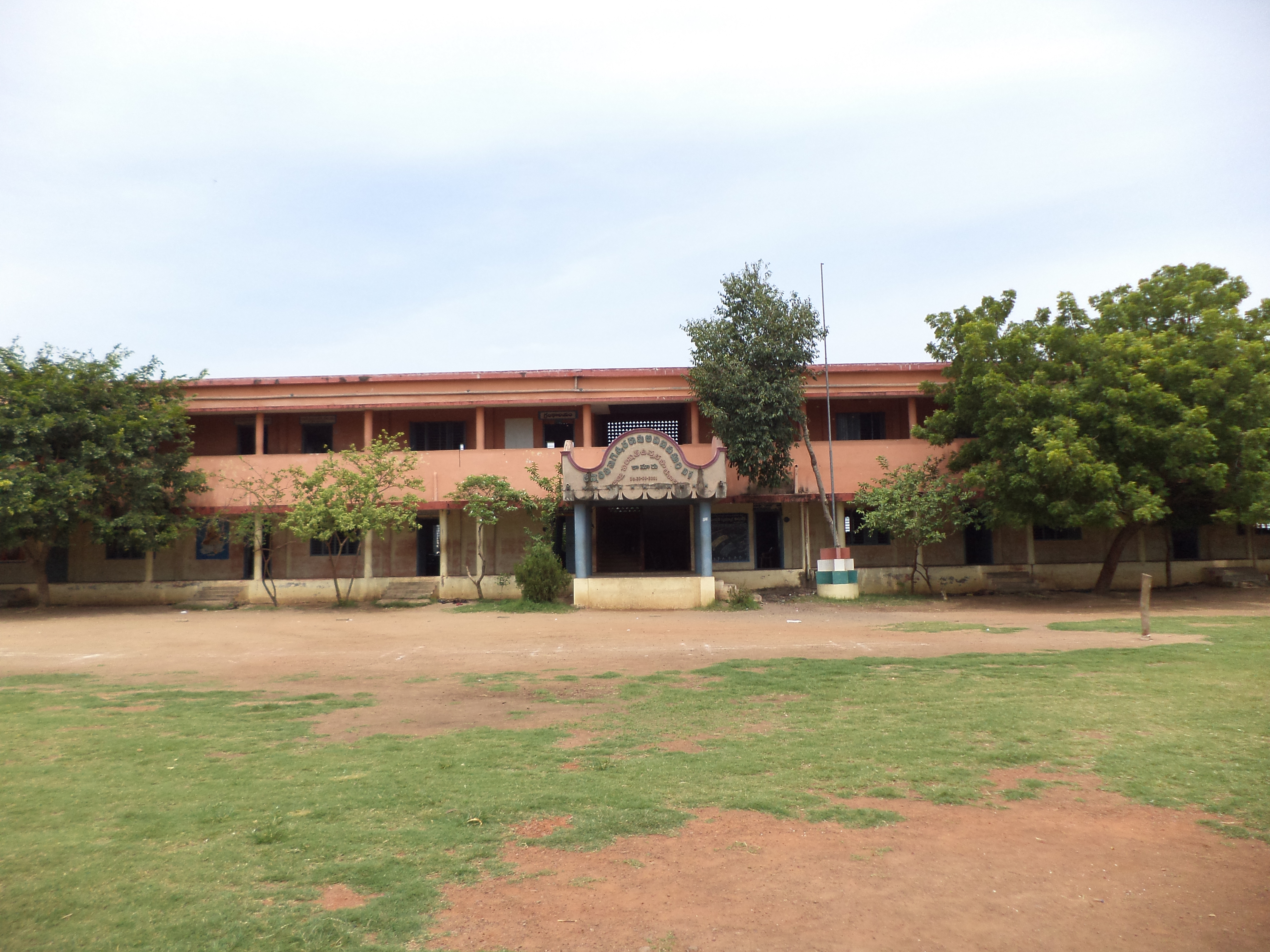 జిల్లా పరిషత్ ఉన్నత పాఠశాల